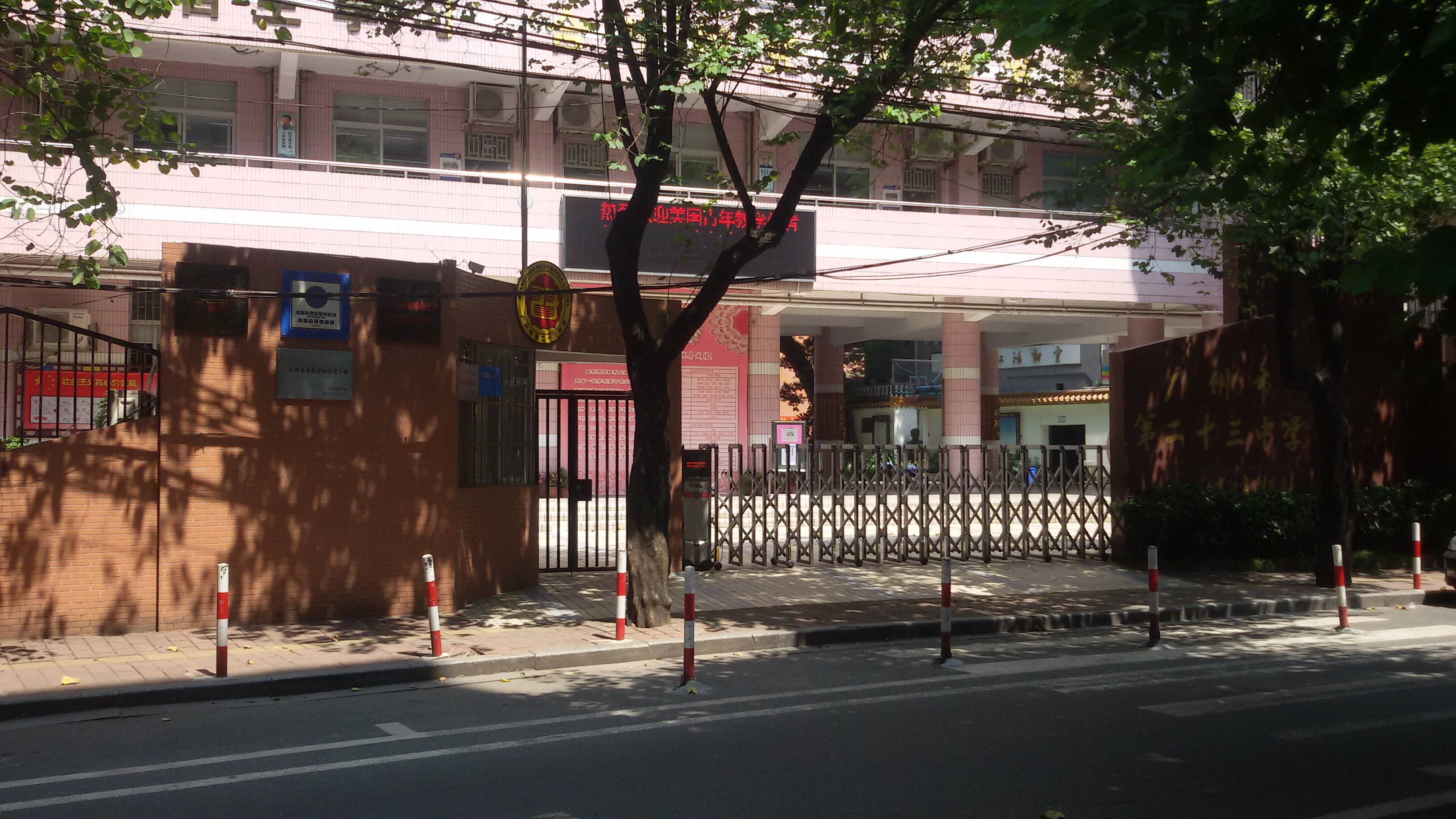 粵語: 广州市第23中学嘅正门